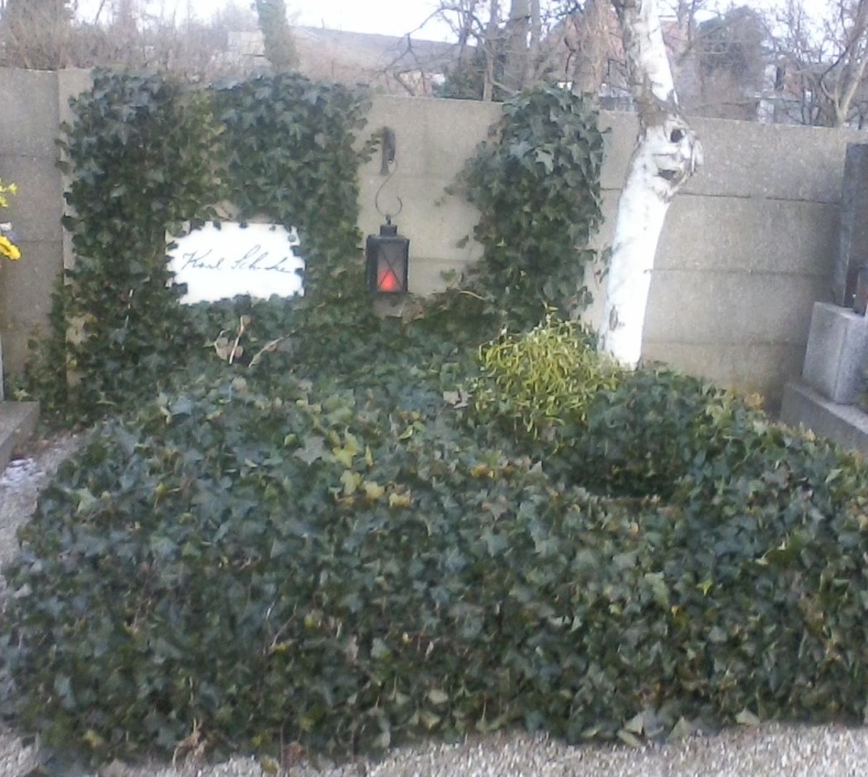 Karl Schiske-Friedhof Orth an der Donau